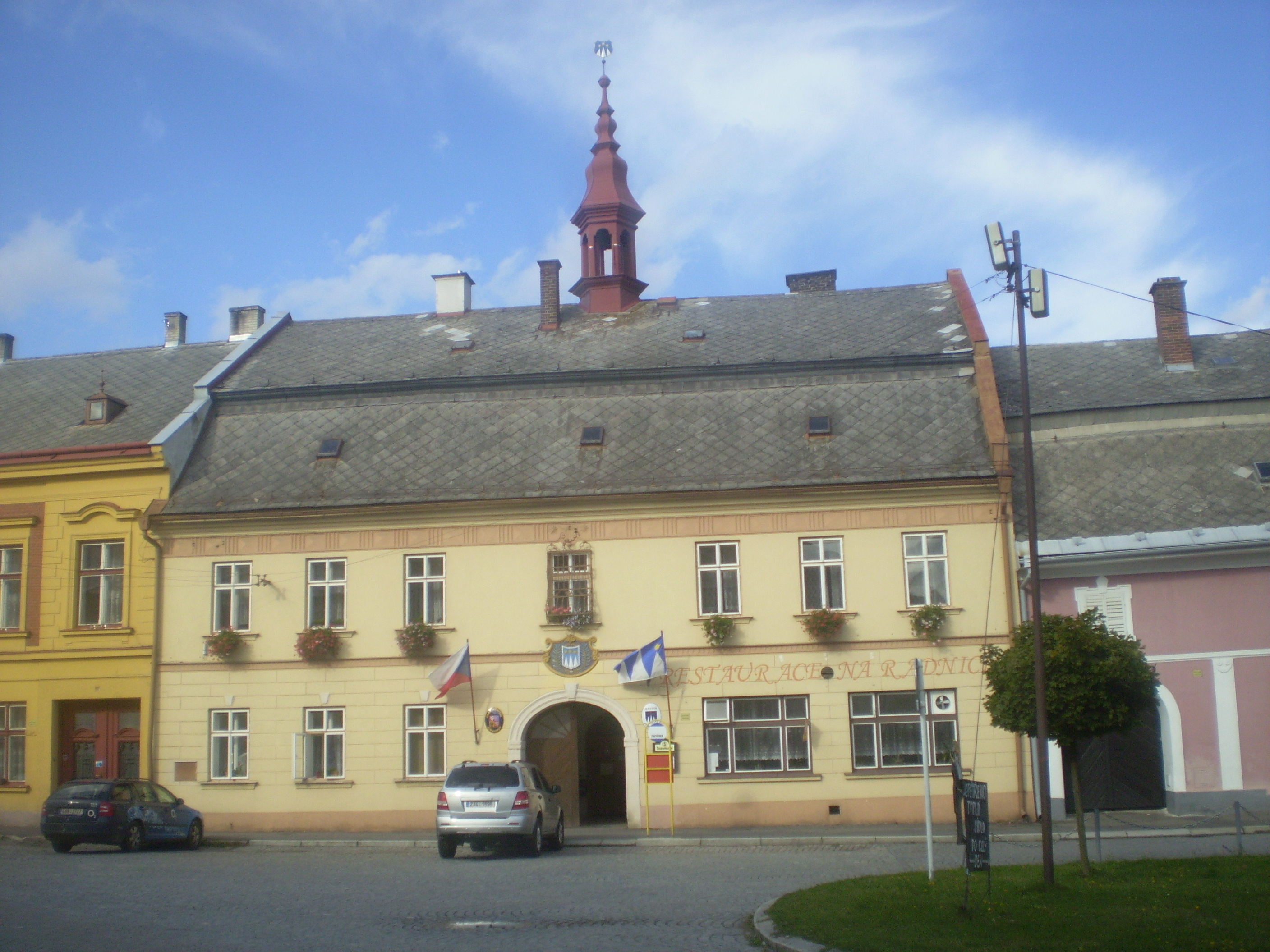 Jimramovská radnice